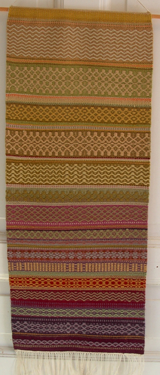 Rosengångsvepa i växtfärgad ull. Se även detalj här